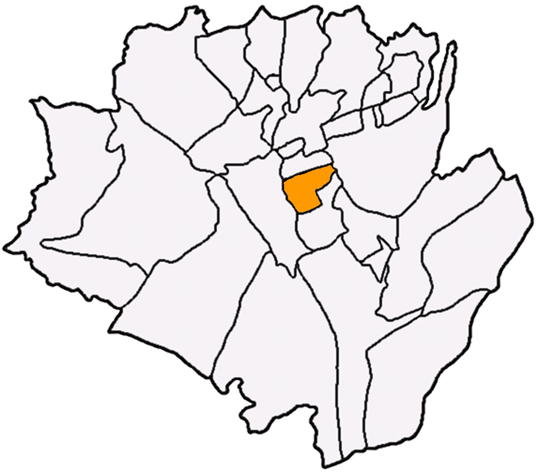 中正里在龍潭區 (台灣)中的位置